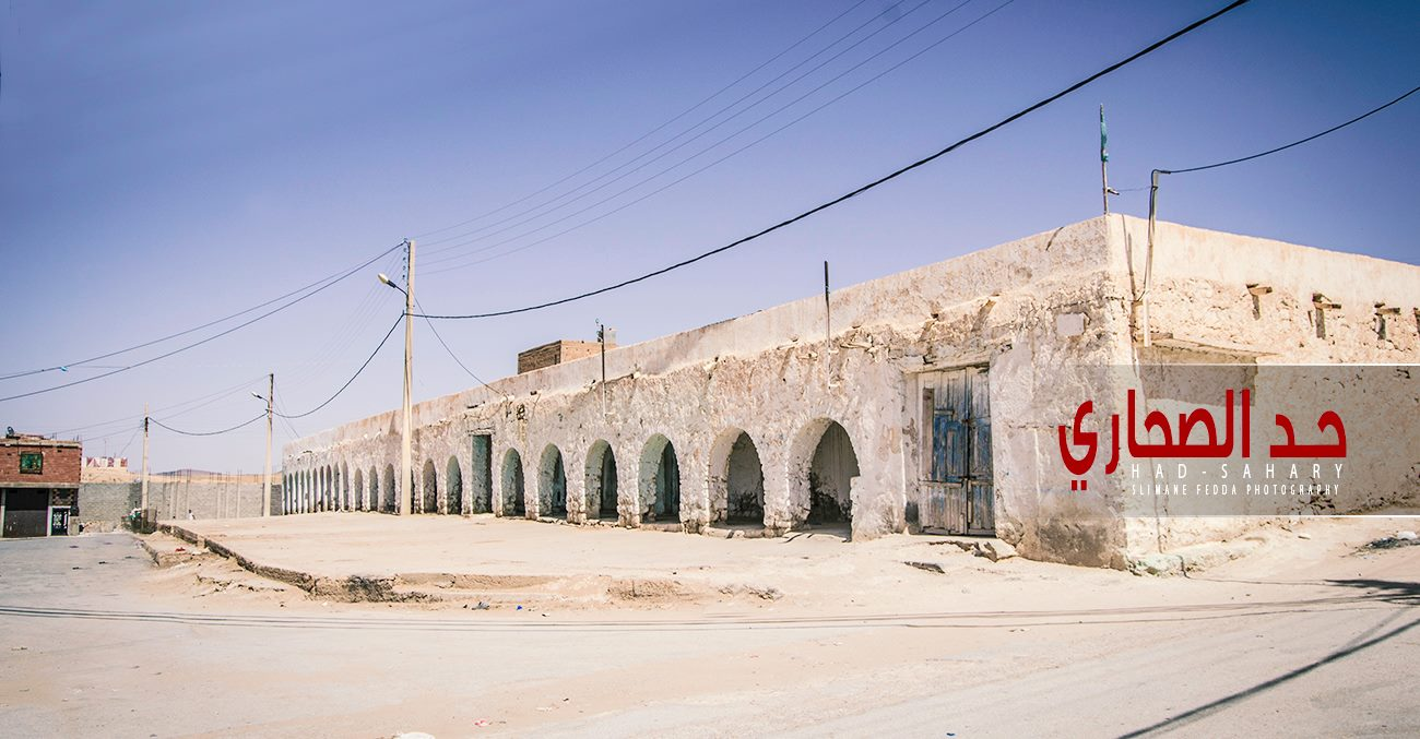 أقدم سوق بحد الصحاري